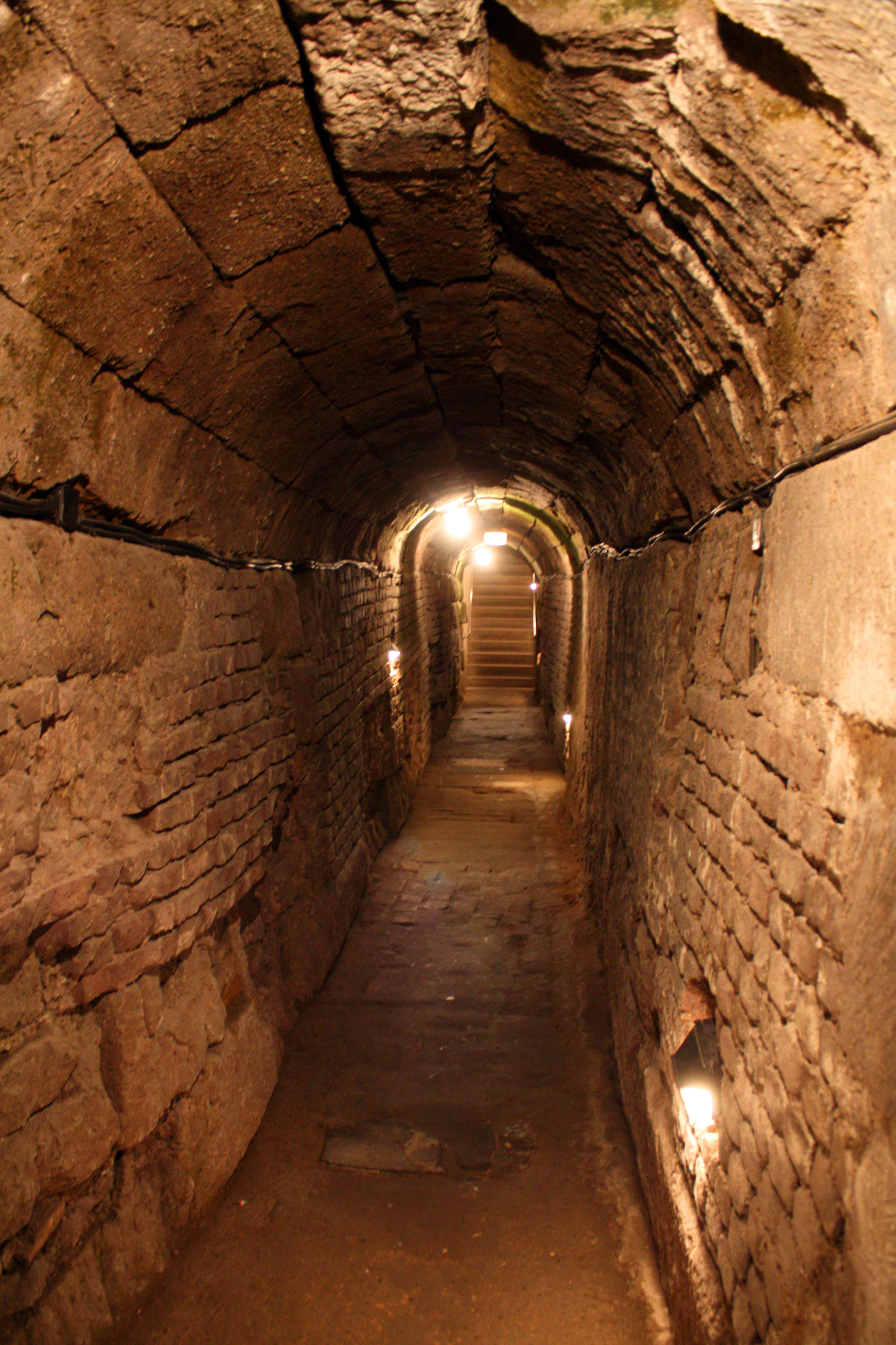 Teilstück eines römischen Abwasserkanals der CCAA, mit einer noch erhaltenen Länge von etwa 145 m. Der Zugang erfolgt über die Ausstellung zum Prätorium (Eingang Köln-Innenstadt, Budengasse)